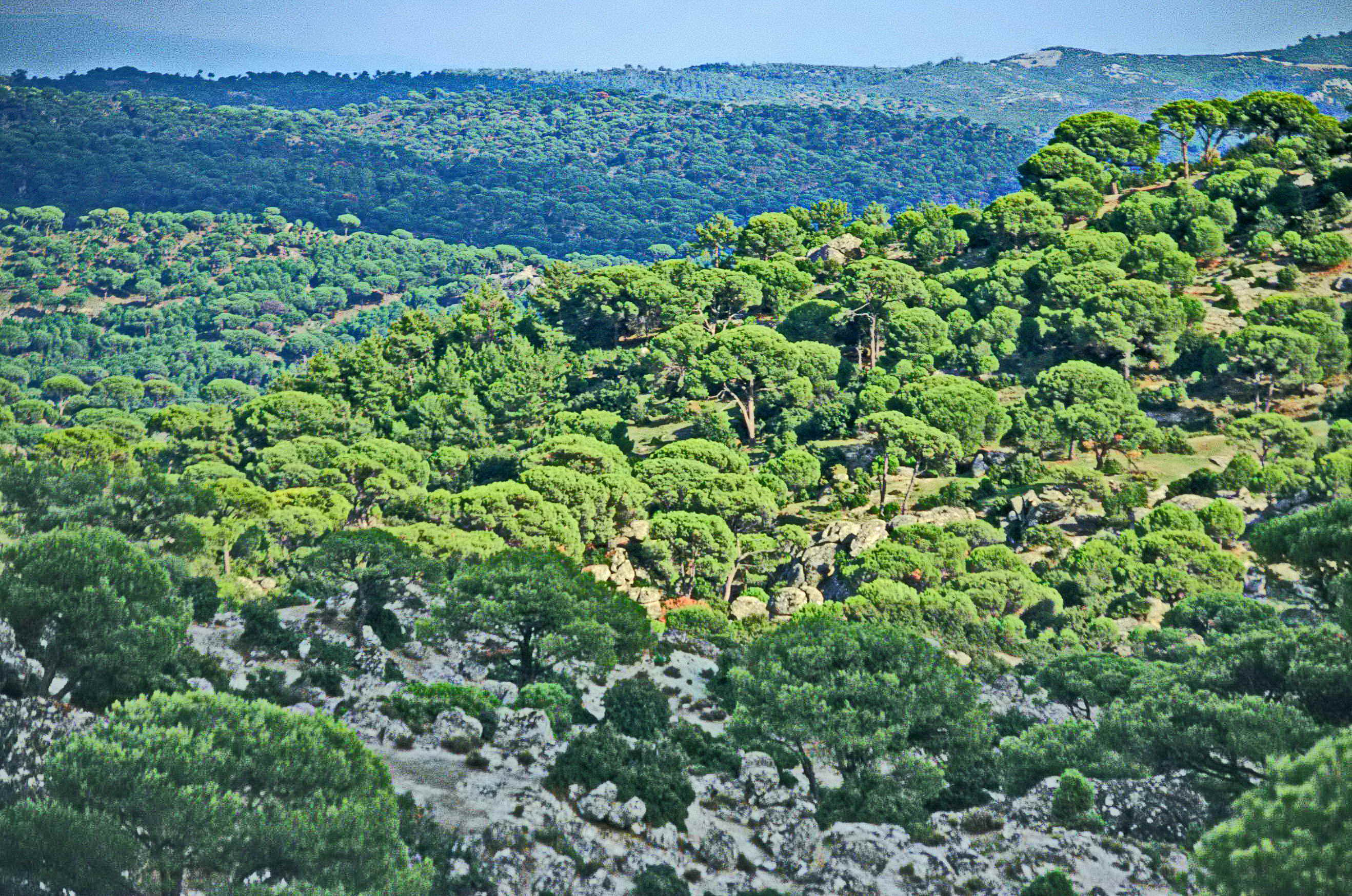 Das Bild zeigt Pinienwälder bei Çavdar in der Westtürkei